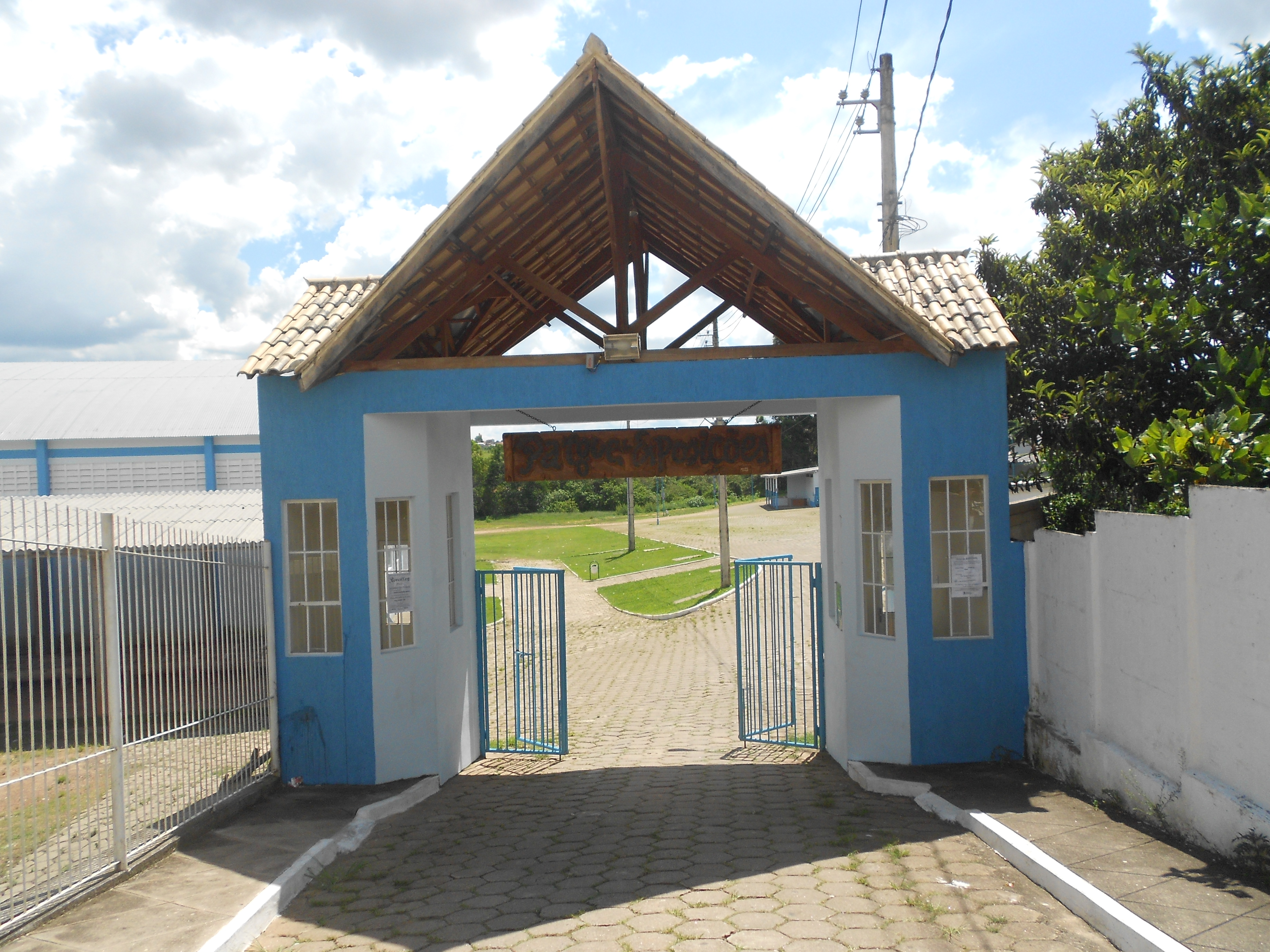 Portão de entrada do Parque de Exposições de Andrelândia, no Serrinha, Andrelândia, Minas Gerais, Brasil.